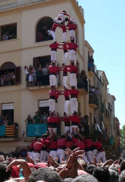 Perimer 5d9f descarregat per la CJXV, Sant Fèlix, 30-VIII-2008. Foto de: Arxiu CJXV.